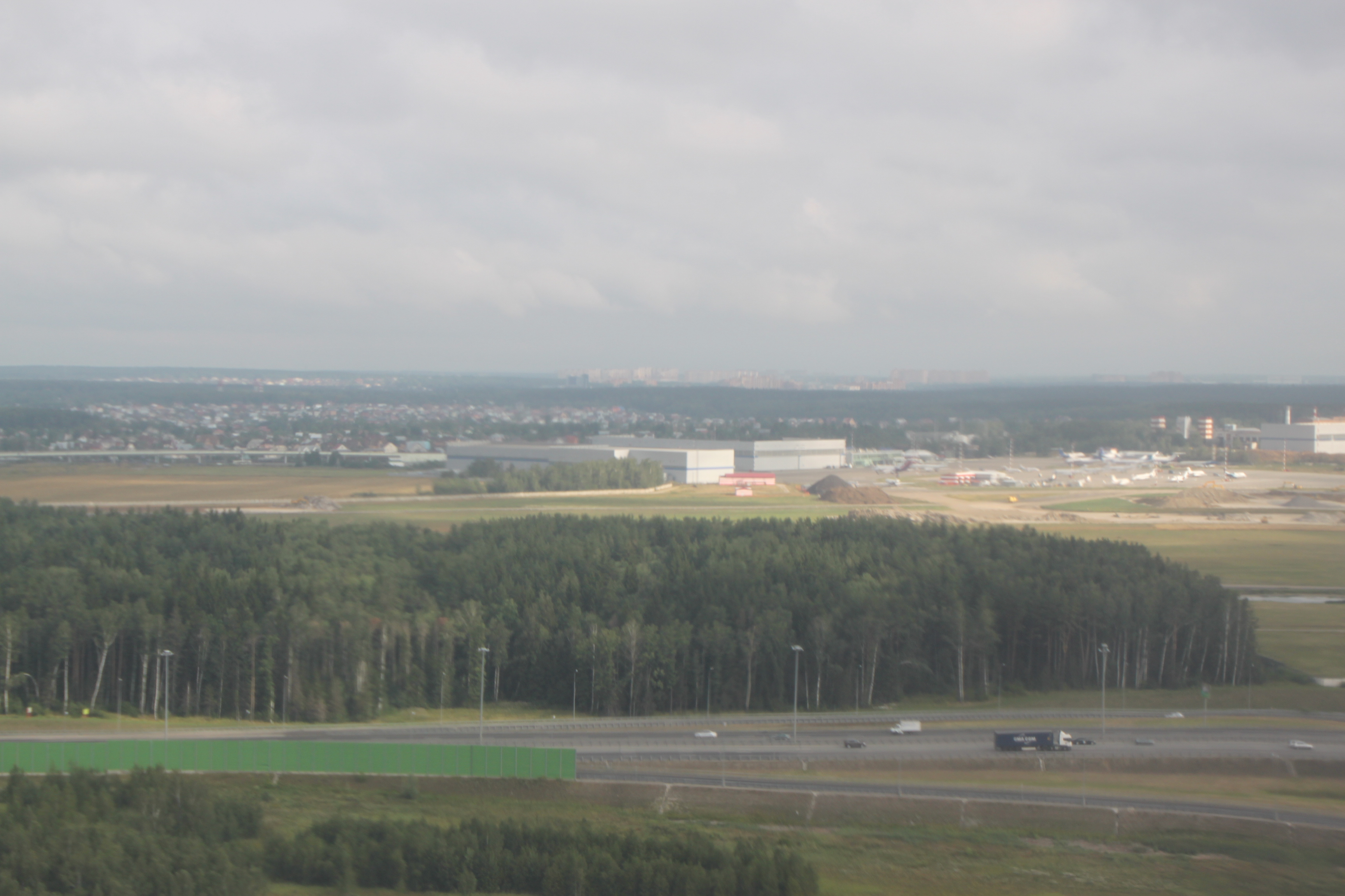 На подлете к Внуково